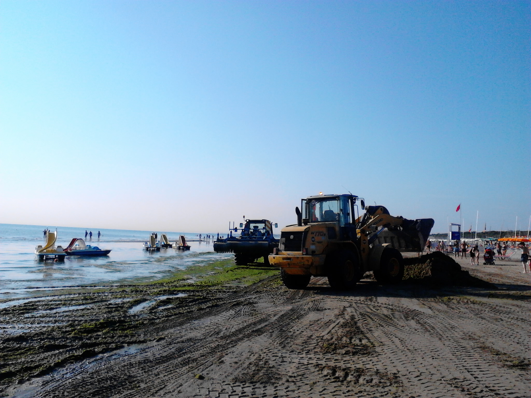 Mezzi impiegati per la rimozione delle alghe nel 2013 a Pinarella di Cervia ITALY